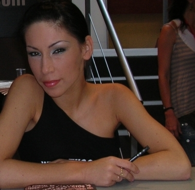 Mya Diamond en el 1º Festival erótico de Madrid.